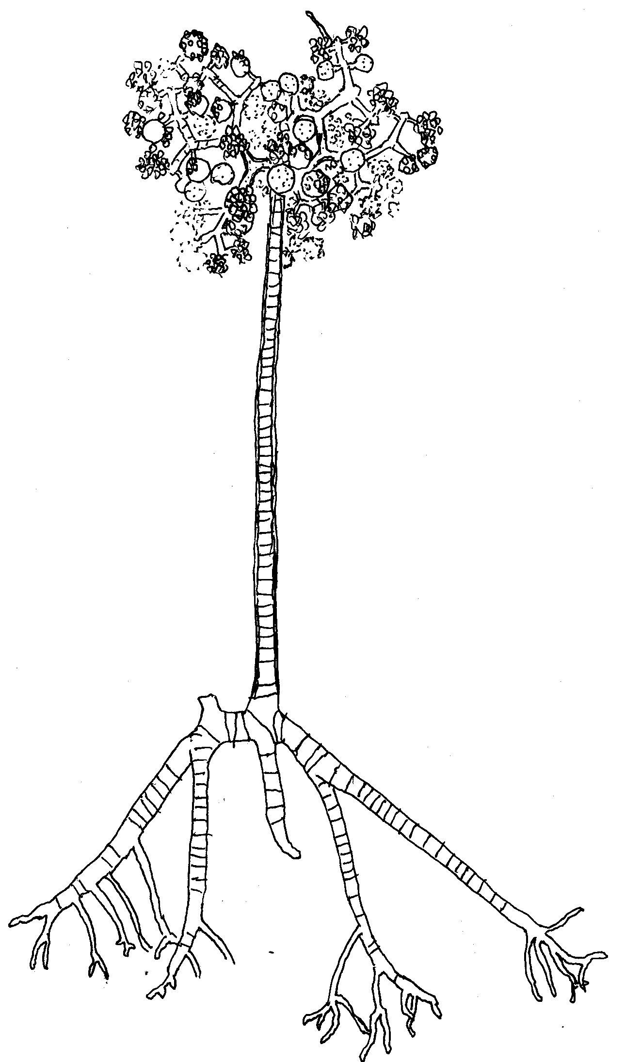 Blakeslee(1905). Botanical gazette Vol.40 No.3 p.161-170. より模写